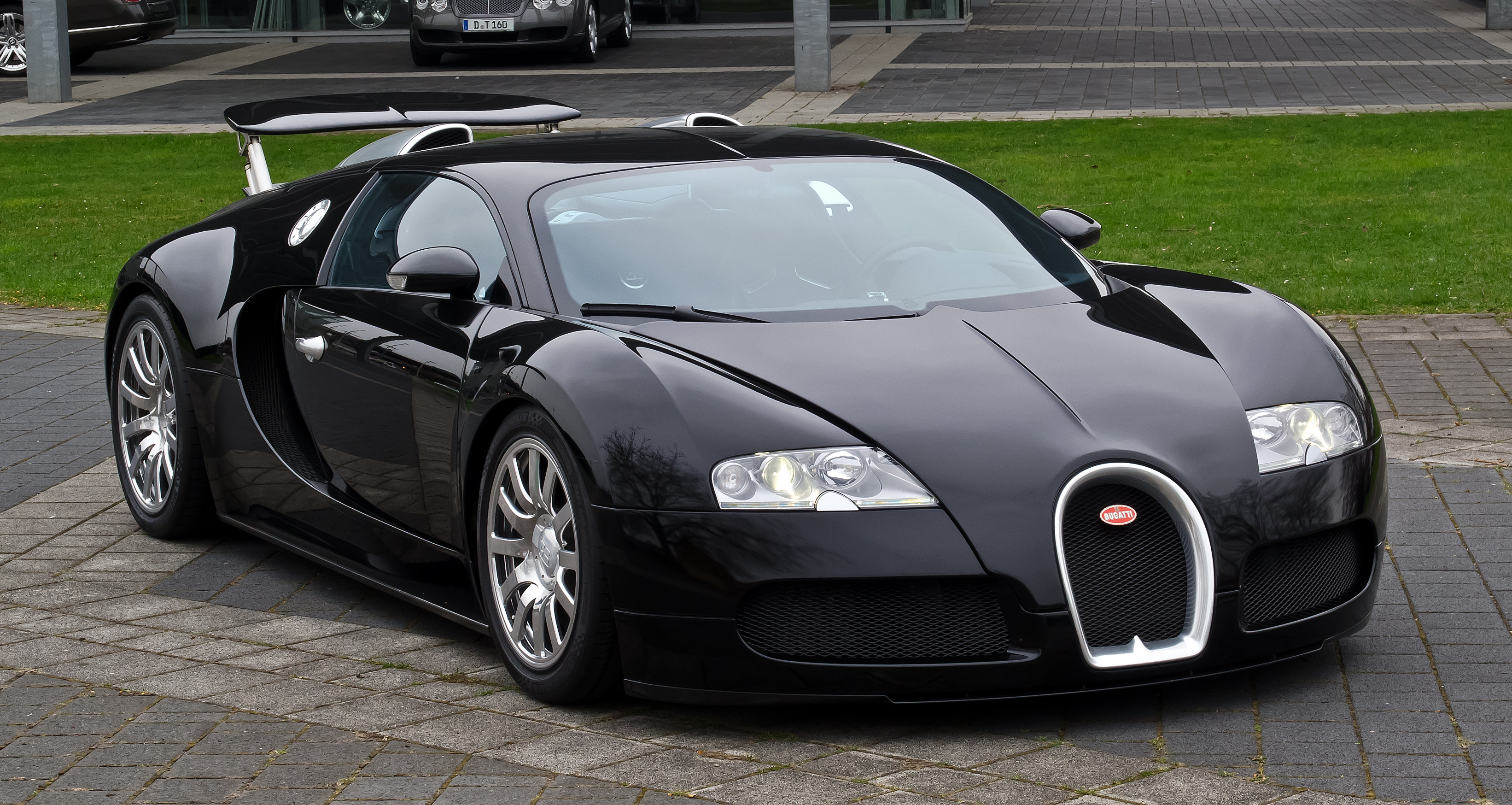 Bugatti Veyron 16.4